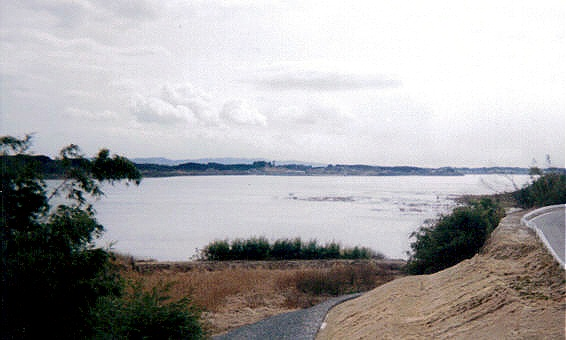 Lake